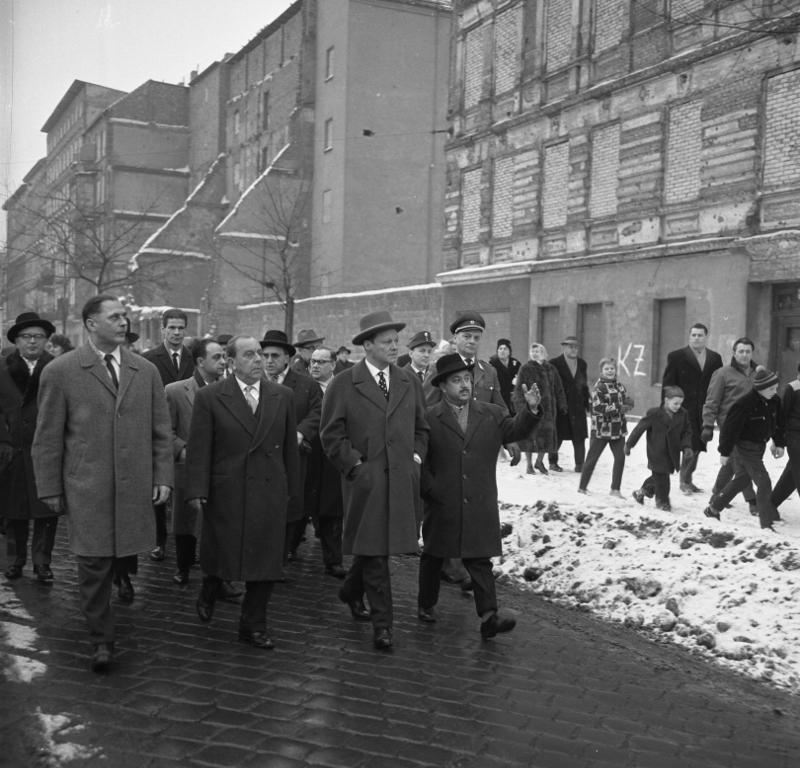 Staatsbesuch Zypern. Vizepräs. Kutchuk Stadtrundfahr, Bernauerstr. West-Berlin